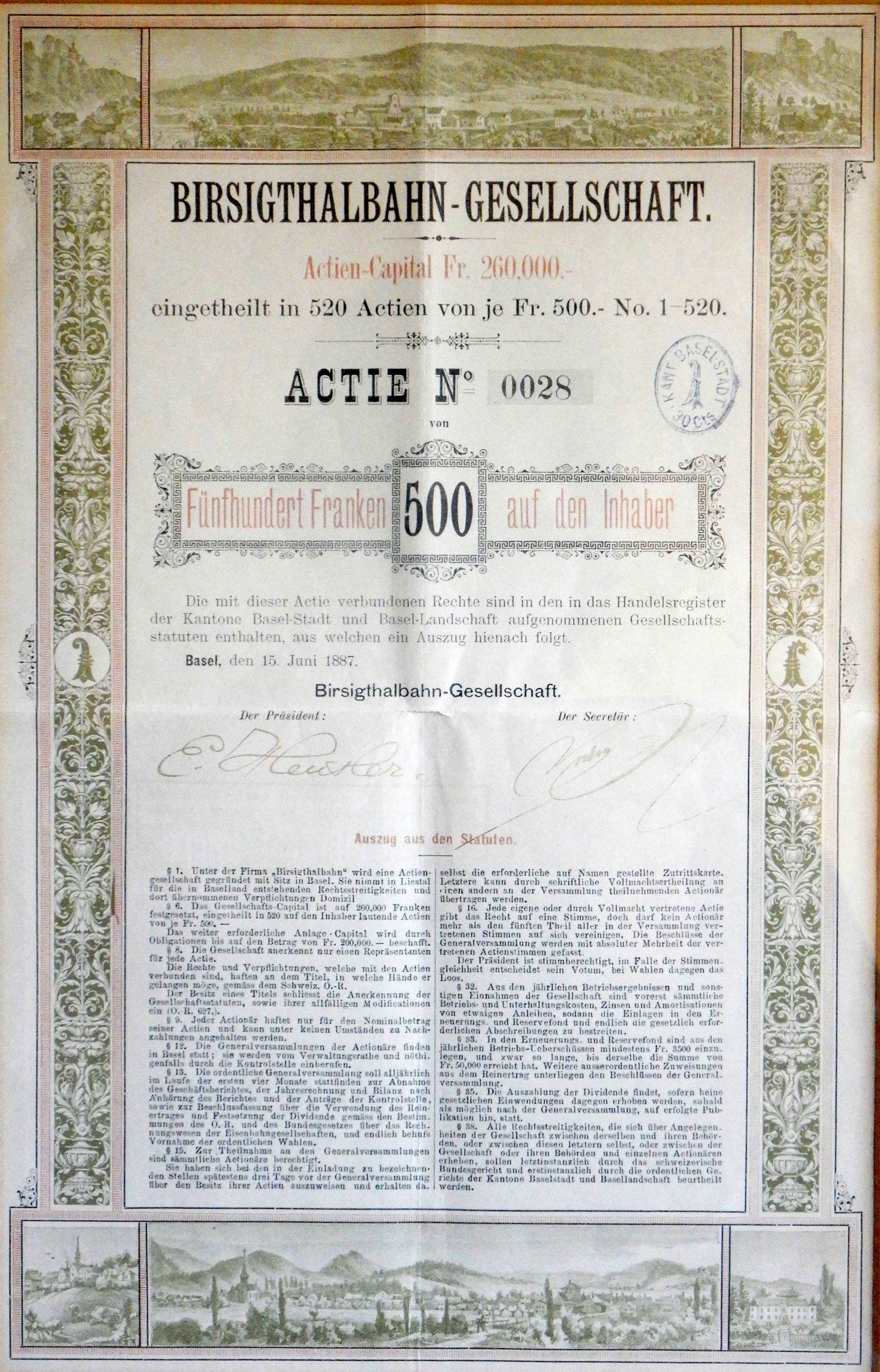 Aktie der Birsigthalbahn, in Privatbesitz.